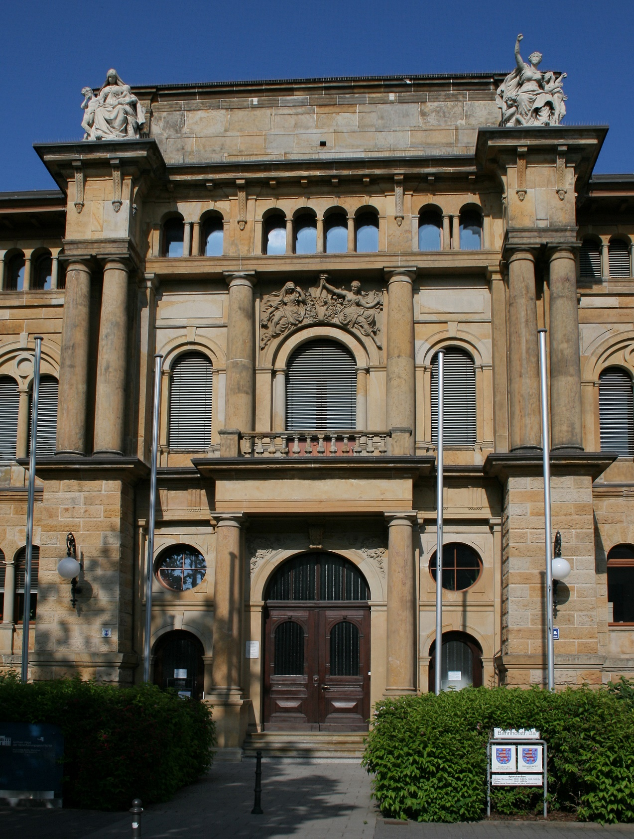 Gebäude des Thüringer Finanzgerichts und des Sozialgerichts Gotha in Gotha.